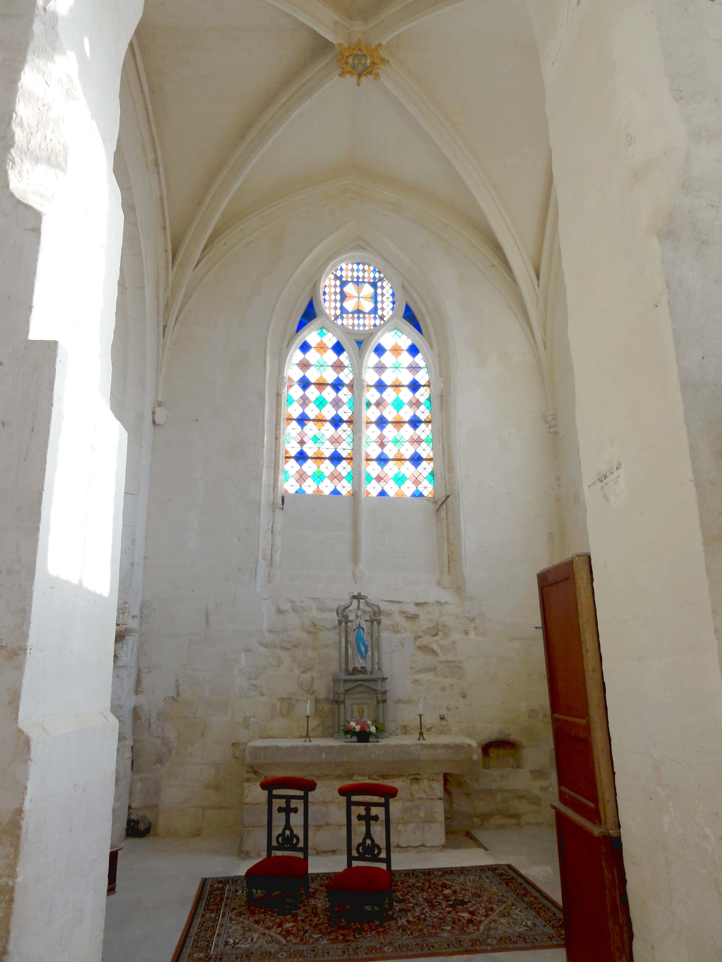 Intérieur de l'église - voir titre.